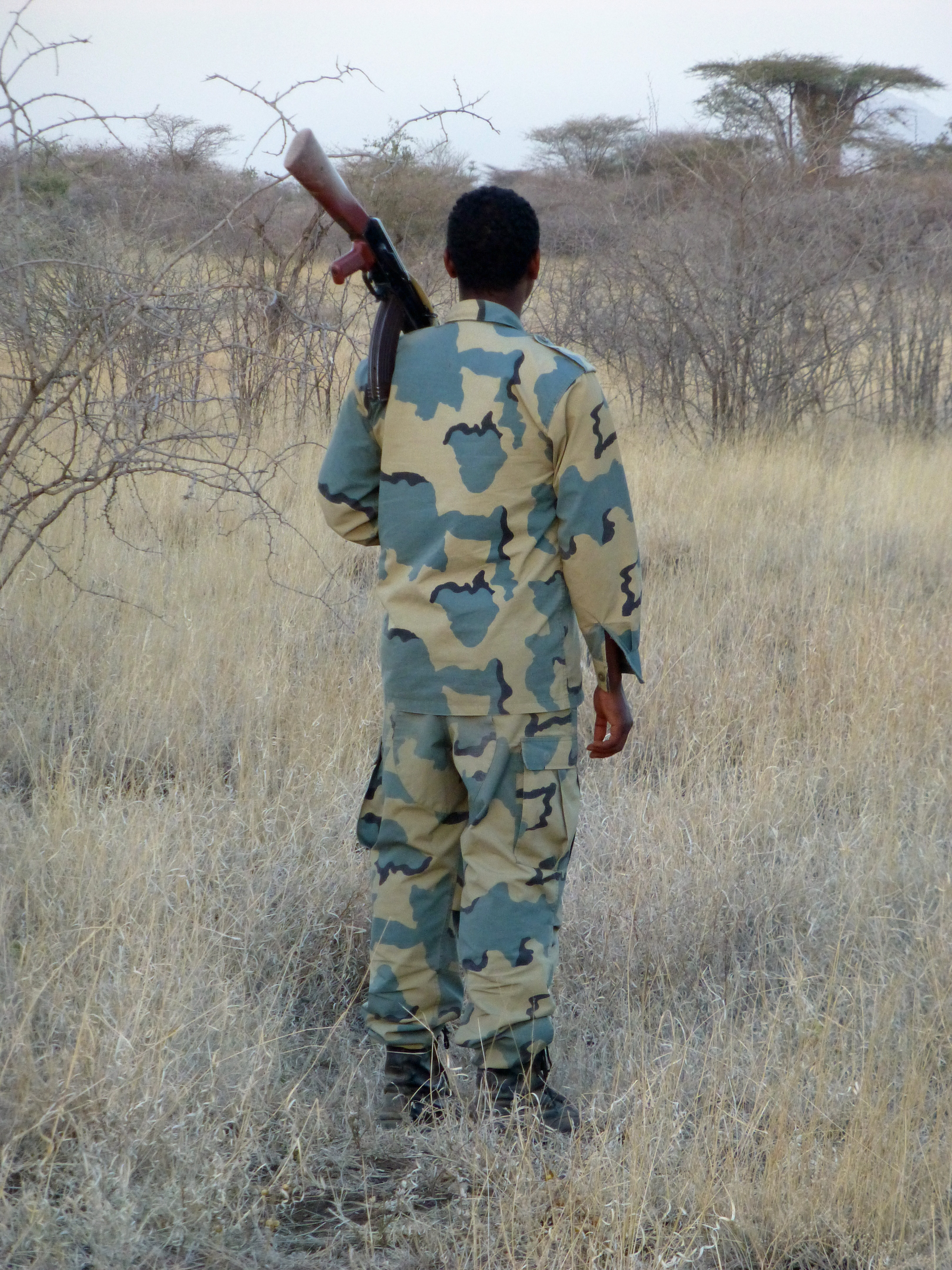 Parc national d'Awash (Ethiopie) : scout (garde armé accompagnant la visite)